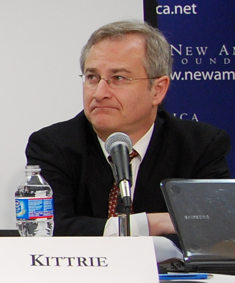 Thomas B. Nachbar, Oren Gross, Michael Waltz, Orde Kittrie